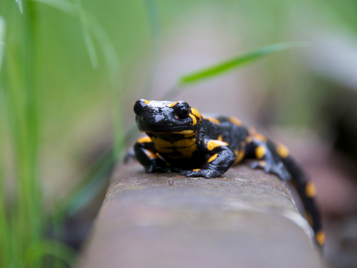 Ein knapp 20 cm langes Feuersalamanderweibchen wärmt sich in den ersten Sonnenstrahlen auf dem Schienenstrang einer stillgelegten Eisenbahnstrecke nahe Lippelsdorf/Thüringen.